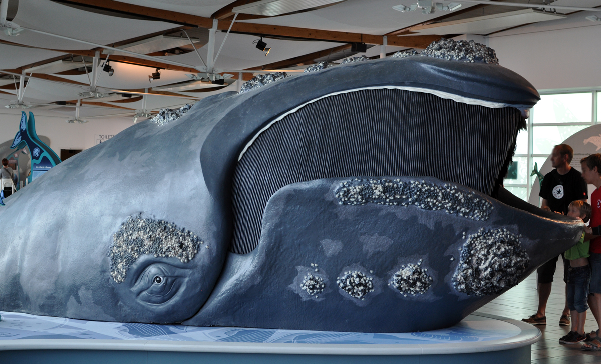 Eubalaena glacialis